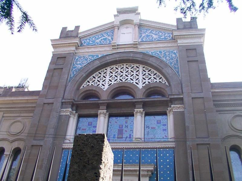 La facciata della Sinagoga di Milano.